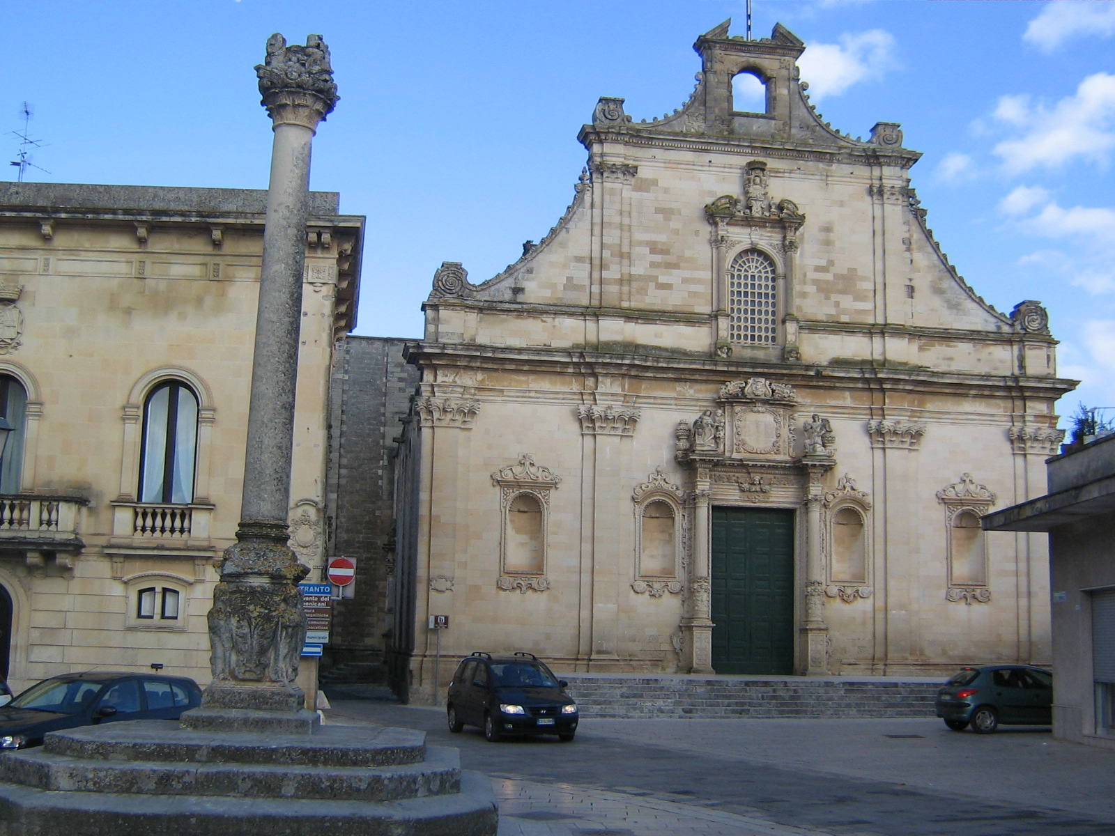 Chiesa madre di Muro Leccese